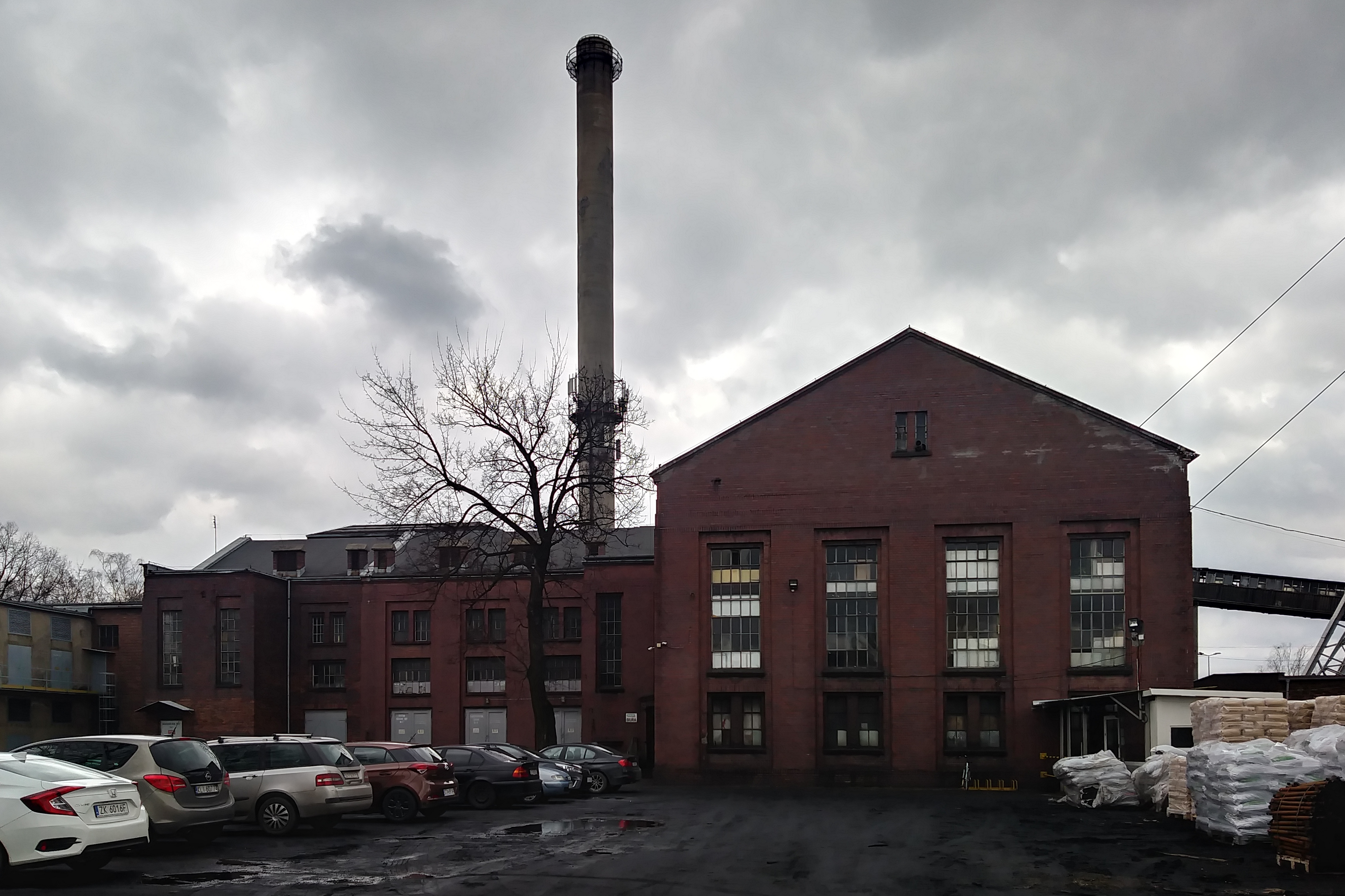 zabudowania dawnej KWK Bytom w Bytomiu obok nadszybia szybu Kopernik w Bytomiu, KWK Bytom, Powstańców Śląskich, obecnie Ekoplus